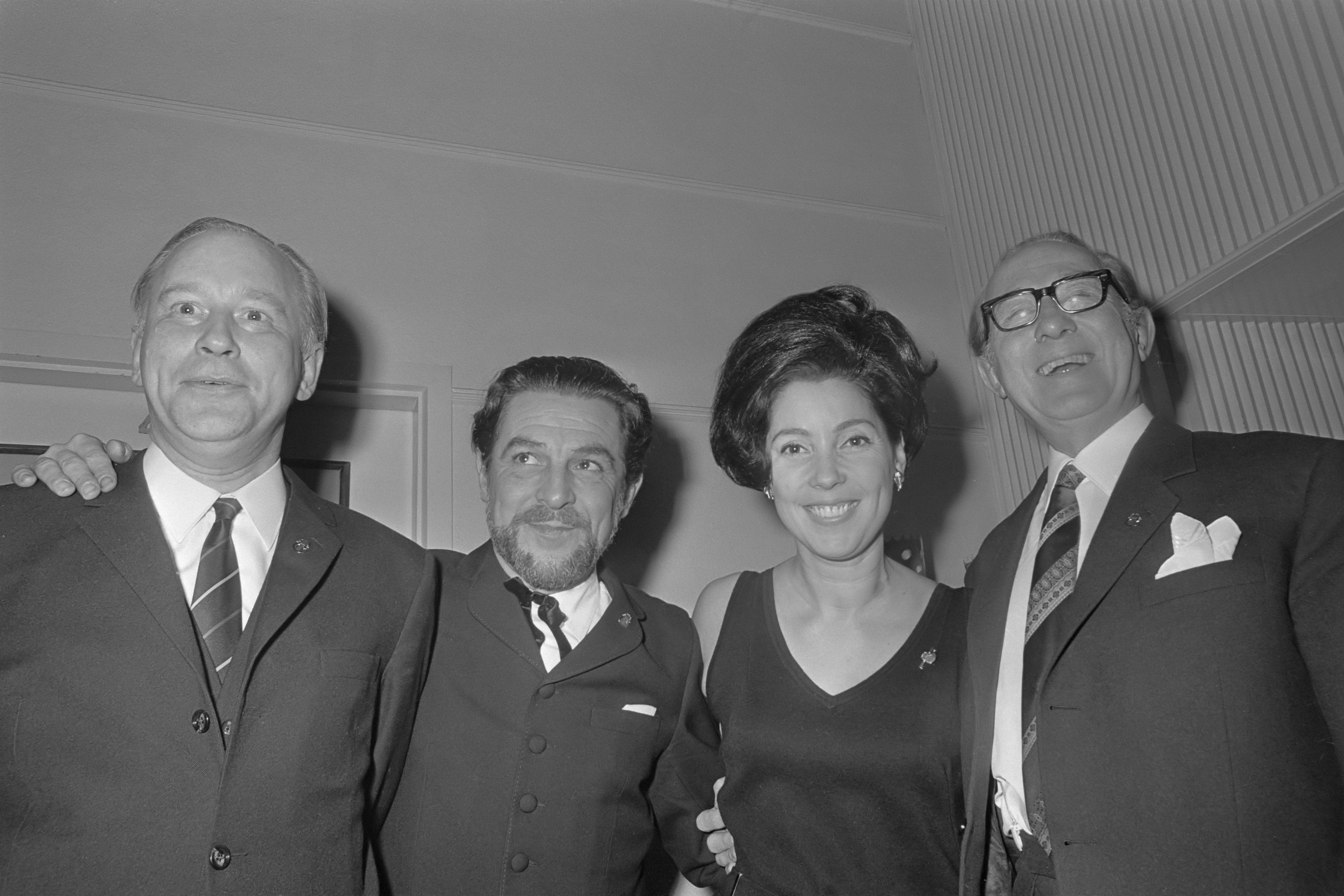 Uitreiking Gouden Harpen te Amsterdam, Carlton aan v.l.n.r. Michel van der Plas, Wim Ibo, Corry Brokken en Herman Tholen 18 november 1968